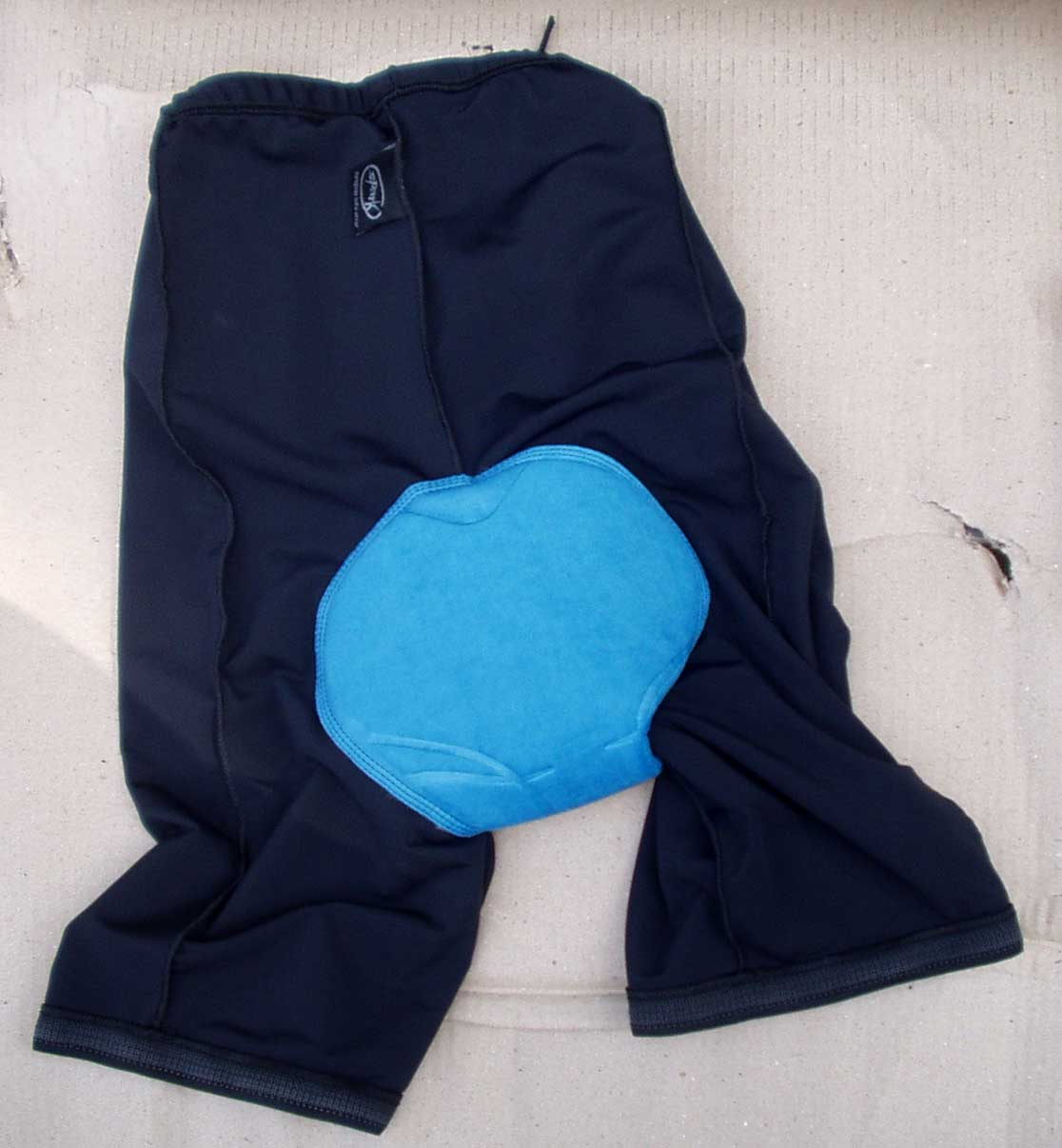 Radlerhose